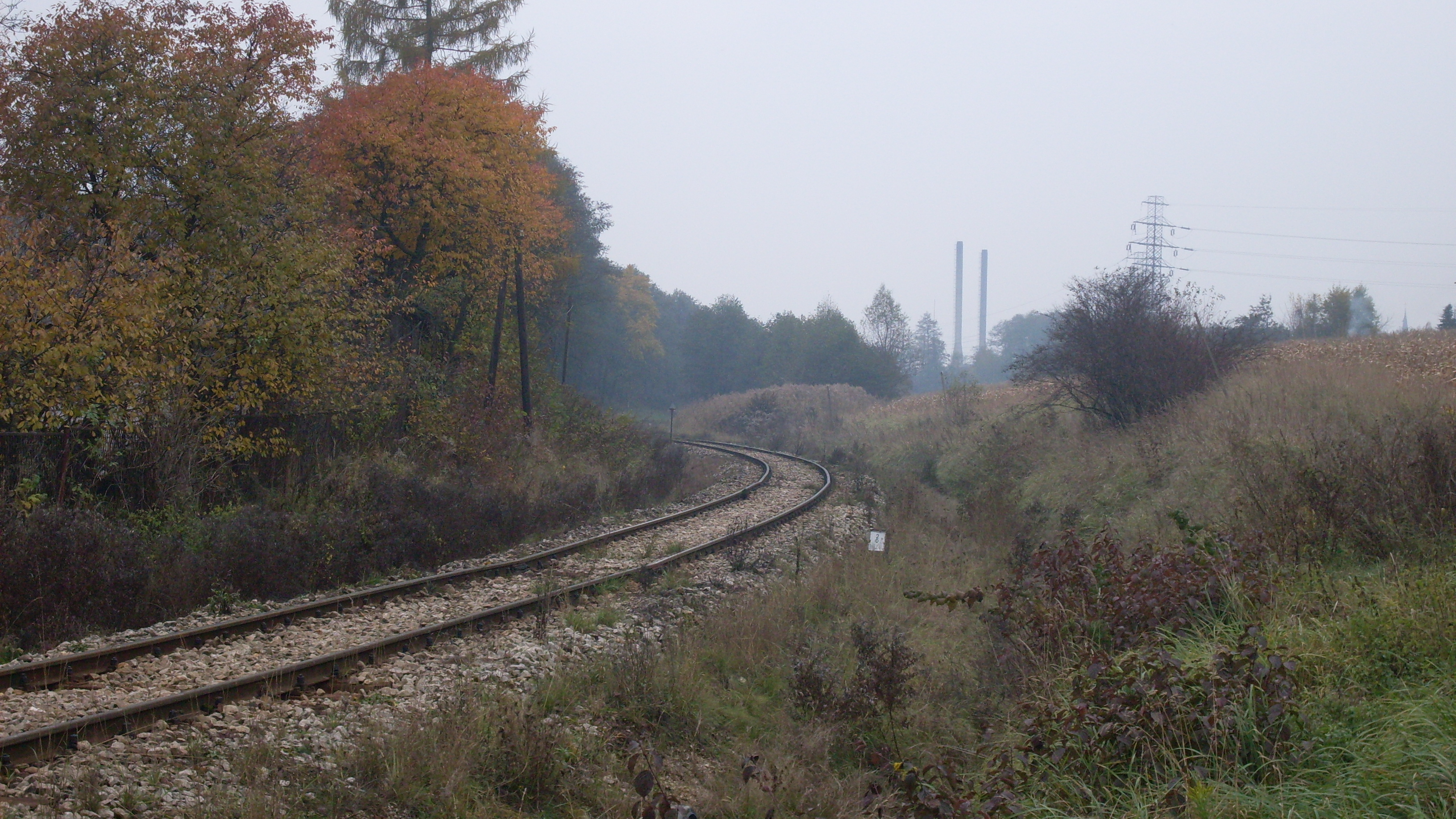 Krzeszowice.Zbik. Bocznica kolejowa